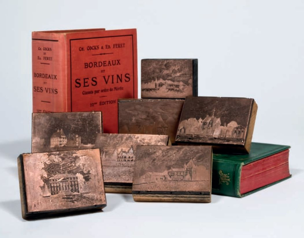 Mise en scène pour la vente aux enchères de typons originaux ayant servis à l'illustration du Guide Féret